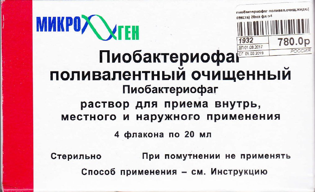 Boîte de Pyobactériophages vendu en Russie par Microgen